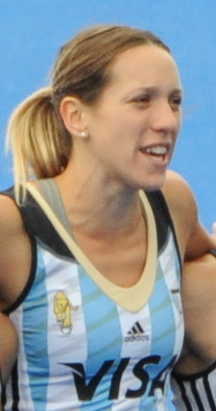 GB v Argentina 2016 CT